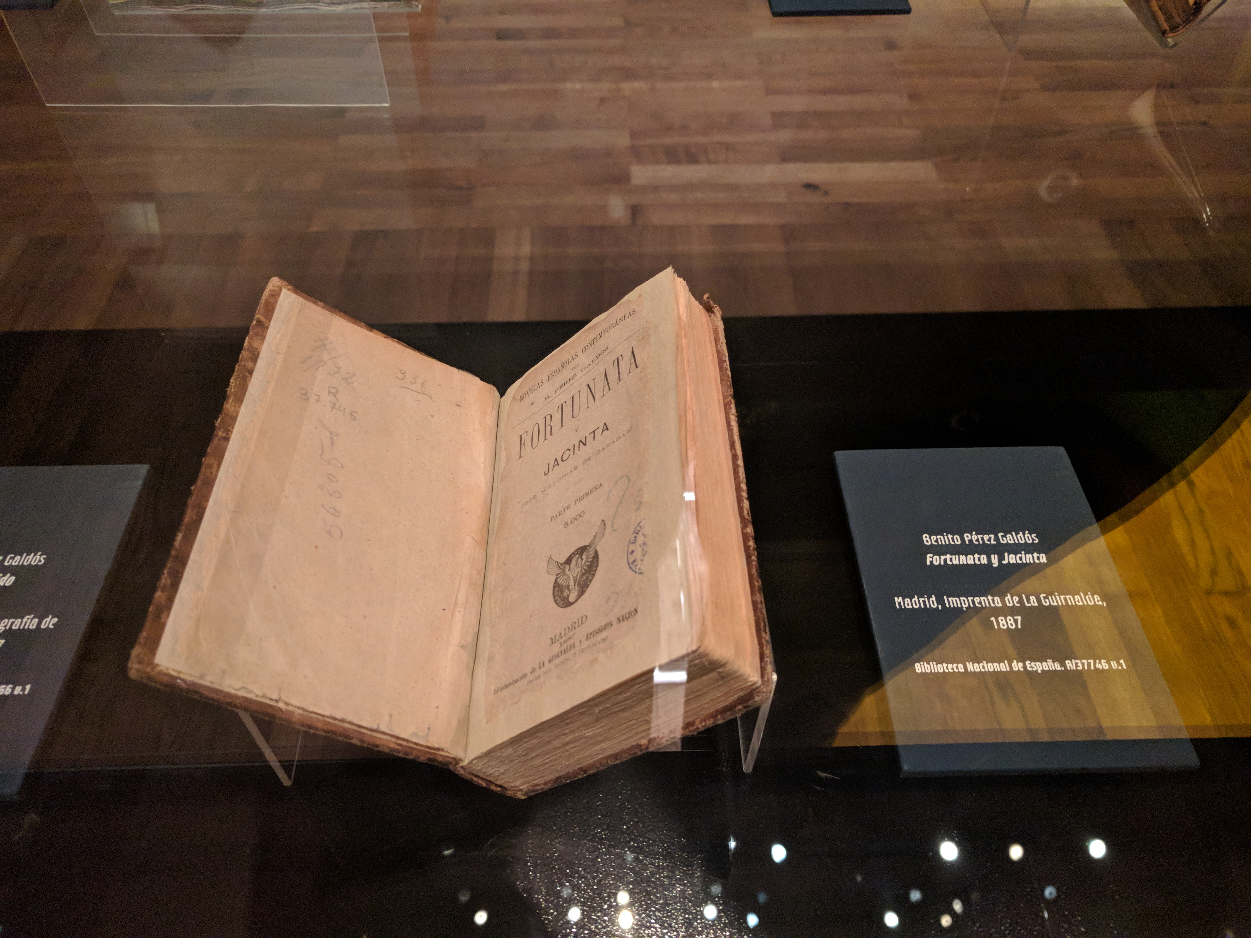 Primera edición de Fortunata y Jacinta de Benito Pérez Galdós, 1887, La Guirnalda. Biblioteca Nacional de España.